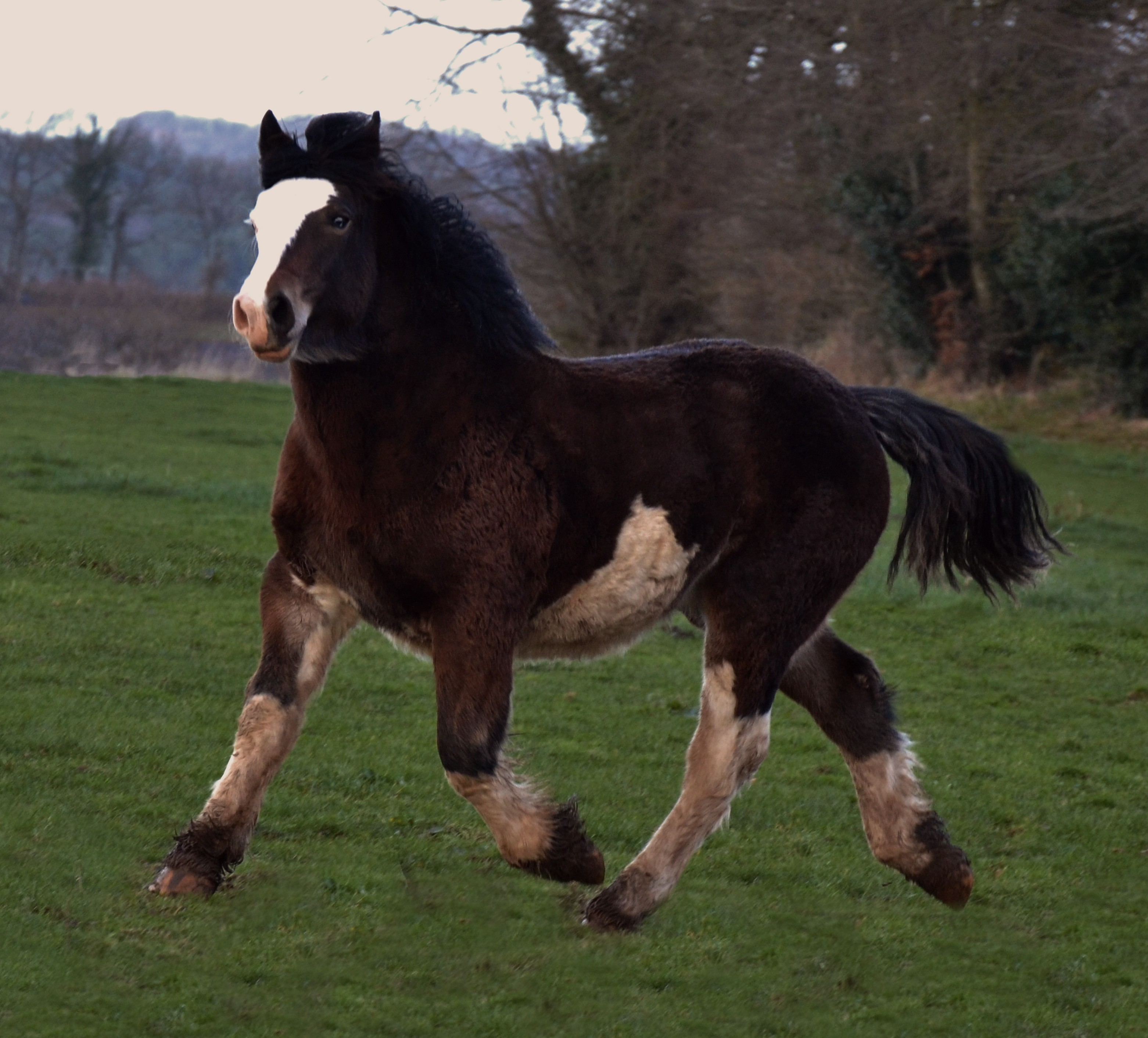 Poulain de race bretonne, de robe Splash White Overo